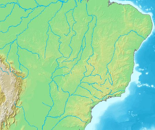 Brasiilia mägismaa kaart